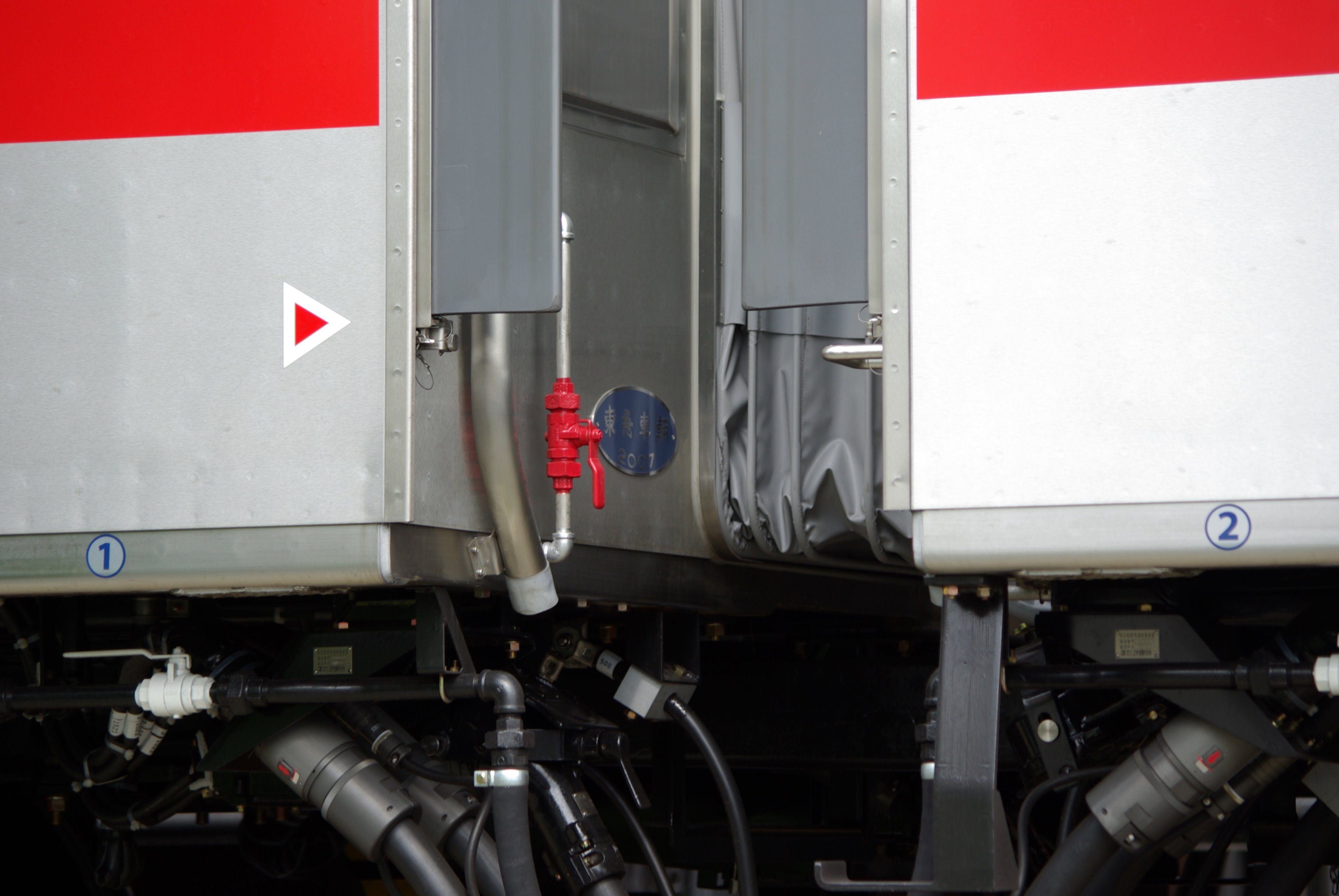 東急5000系電車 (2代) デハ5266のドアコック